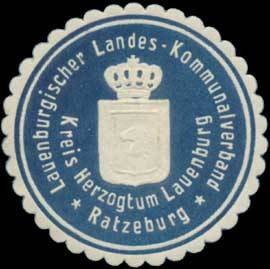 Sealing stamp Title: Lauenburgischer Landes- Kommunalverband Description: Kreis Herzogtum Lauenburg, blau, weiß, geprägt Place: Ratzeburg size: 4 cm